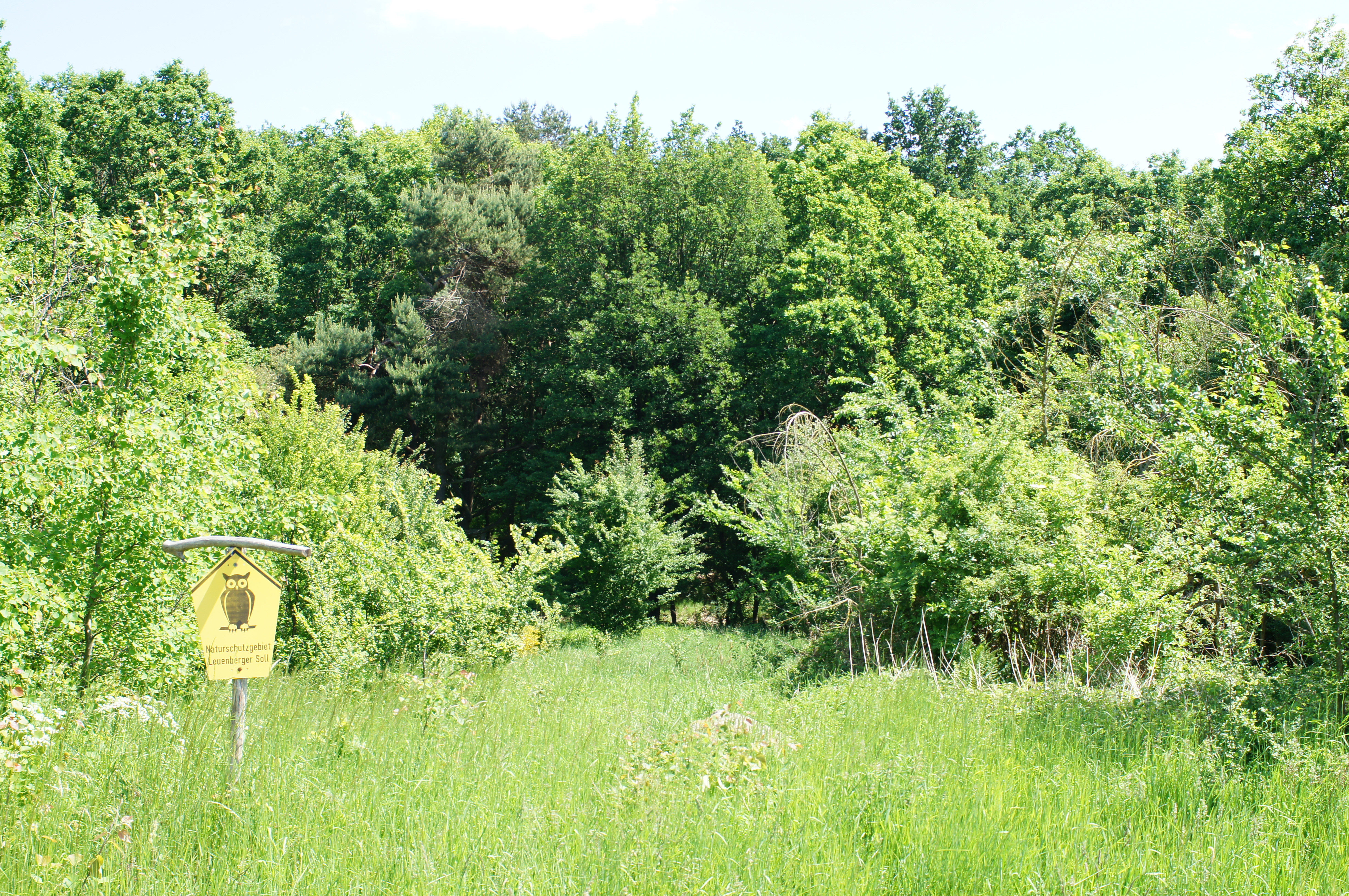 Naturschutzgebiet Leuenberger Soll in Leuenberg, Landkreis Märkisch-Oderland, Brandenburg, Deutschland. Kennung: 1096